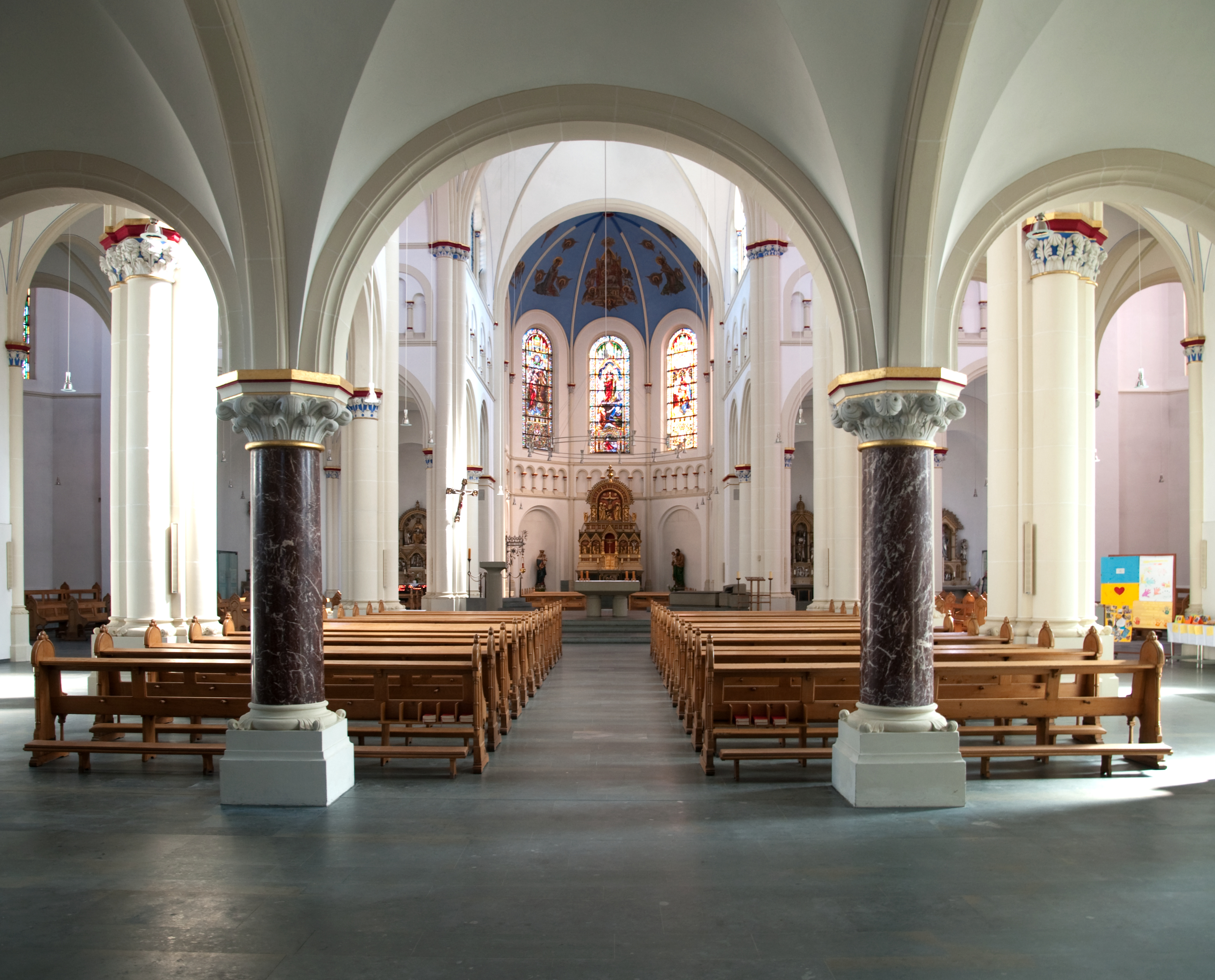 Pfarrkirche St. Johannes Baptist (Neheim), Mittelschiff vom Hauptportal gesehen